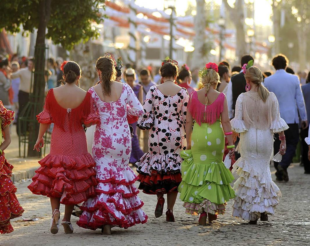 Feria de abril de 2011, Sevilla